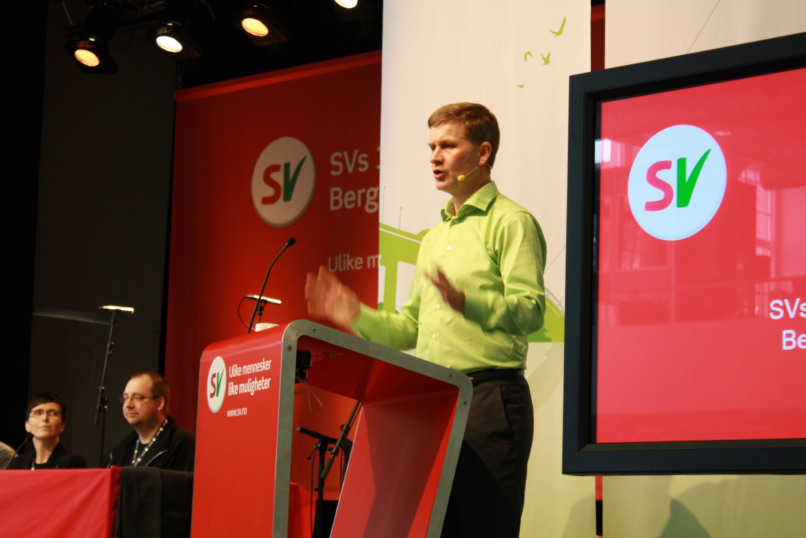 Erik Solheim på SV-landsmøtet 2009